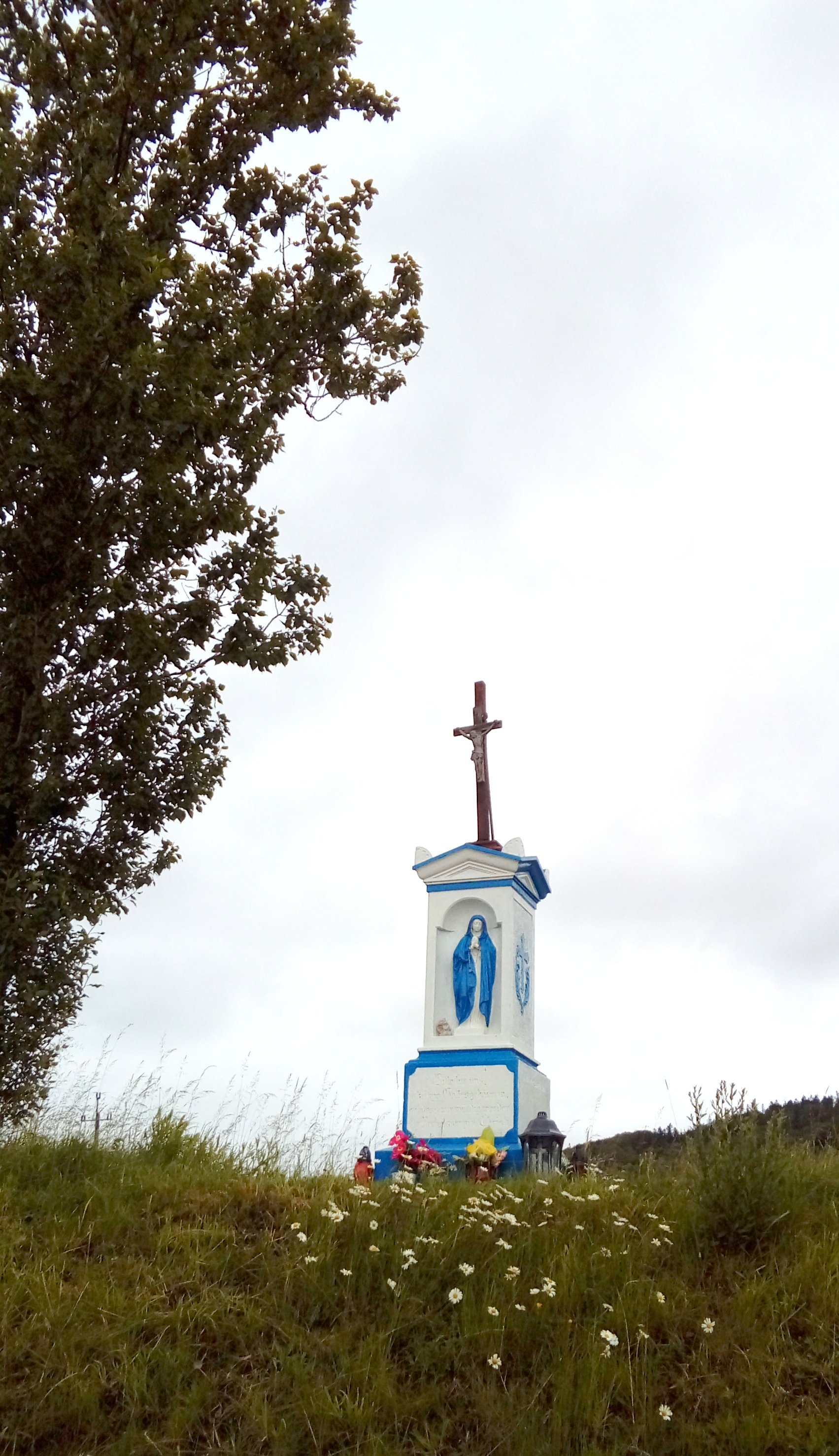 Przedwojów, krzyż przydrożny przy DK 5 z figurą Matki Bożej